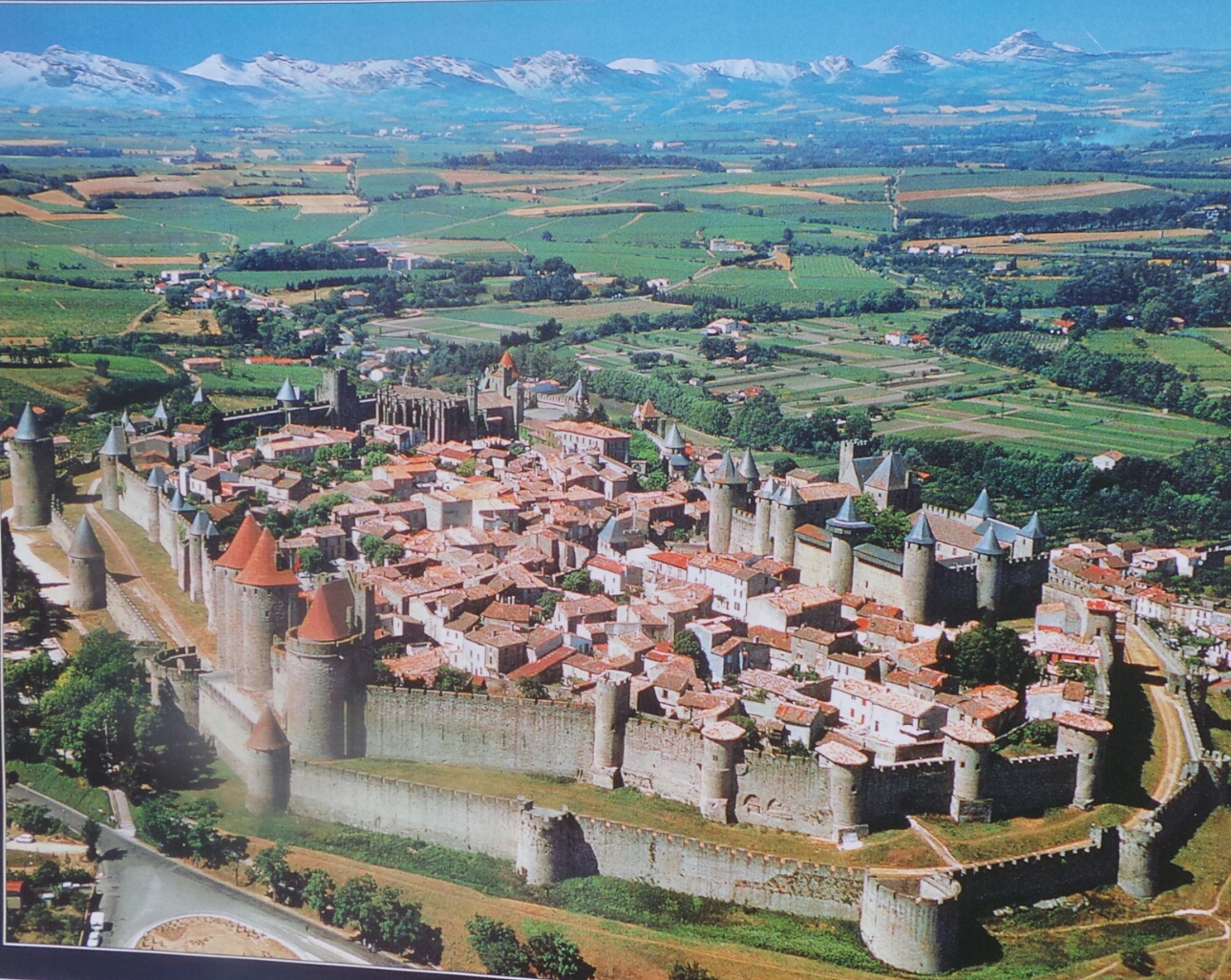 La Cité Médiévale, 11000 Carcassonne, France